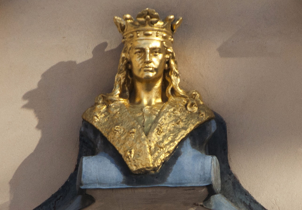 Portalfigur för Apoteket Sankt Erik som låg vid Fleminggatan 75 1903-198